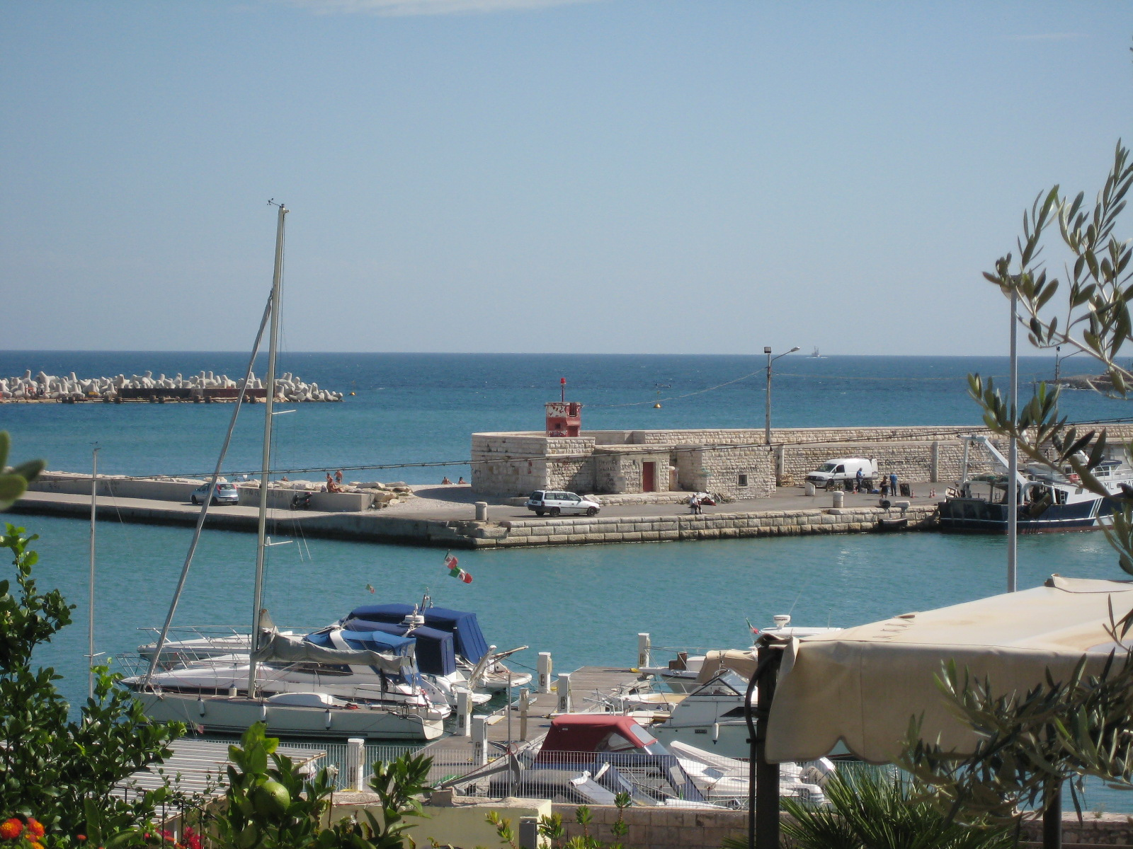 Porto di Bisceglie. Testata del molo borbonico con fanale a luce rossa